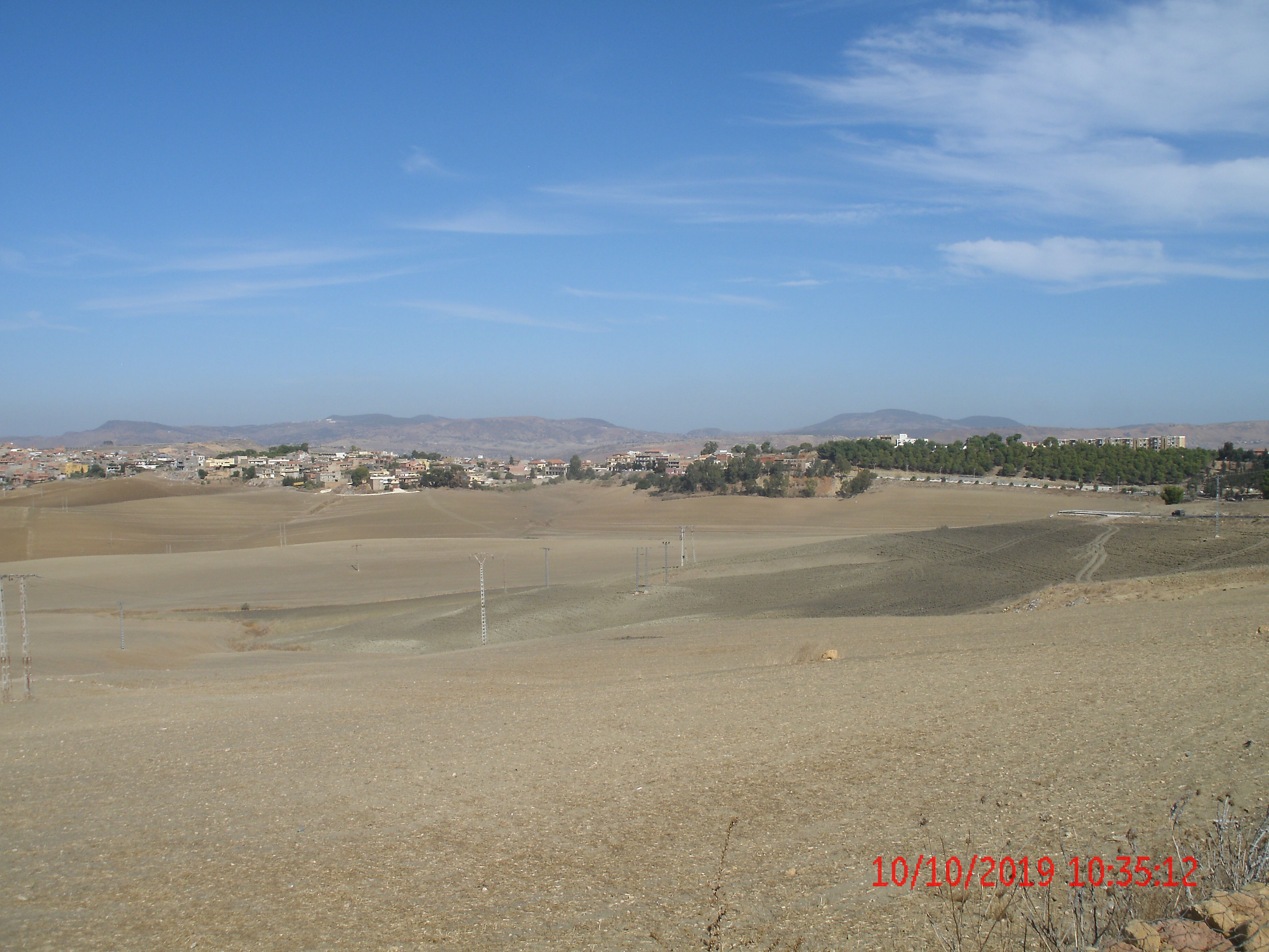 Situation de la ville de Sidi M'Hamed Ben Ali